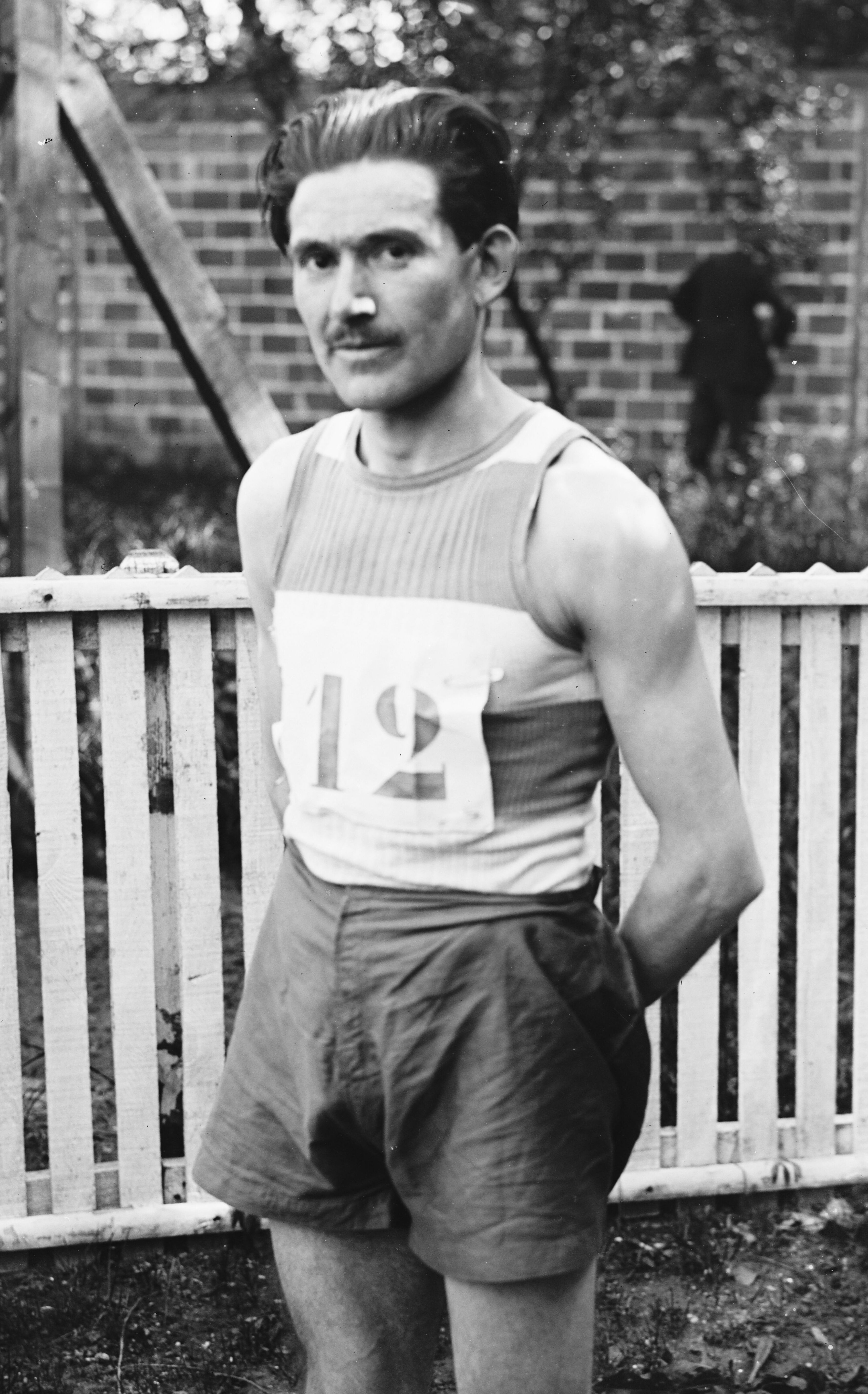 14-5-22, meeting du printemps à Colombes, [Gaston] Heuet gagnant des 3 kilomètres : [photographie de presse] / [Agence Rol]